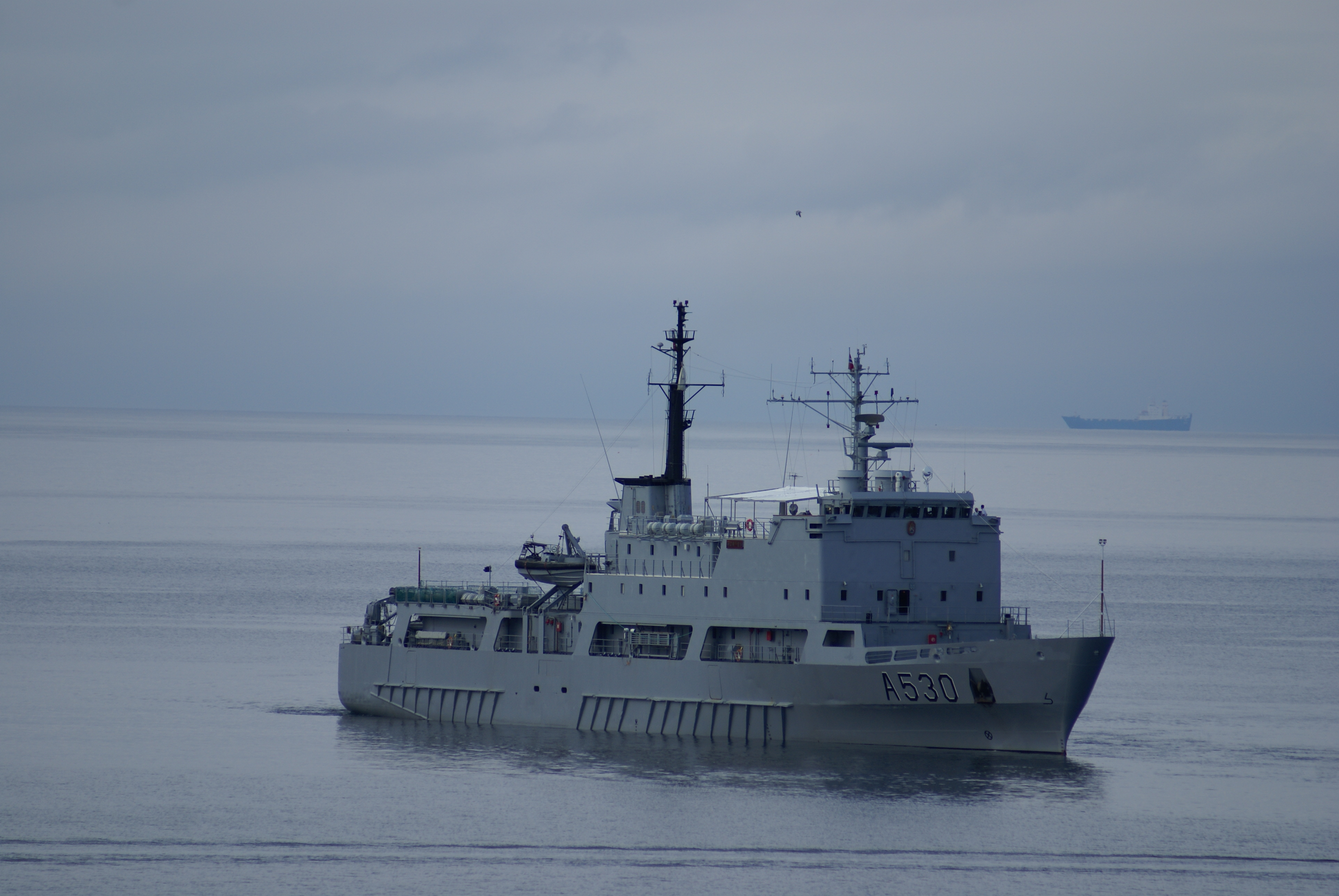 KNM Horten ved åpningen av Spangereidkanalen IMO Number: 6127047